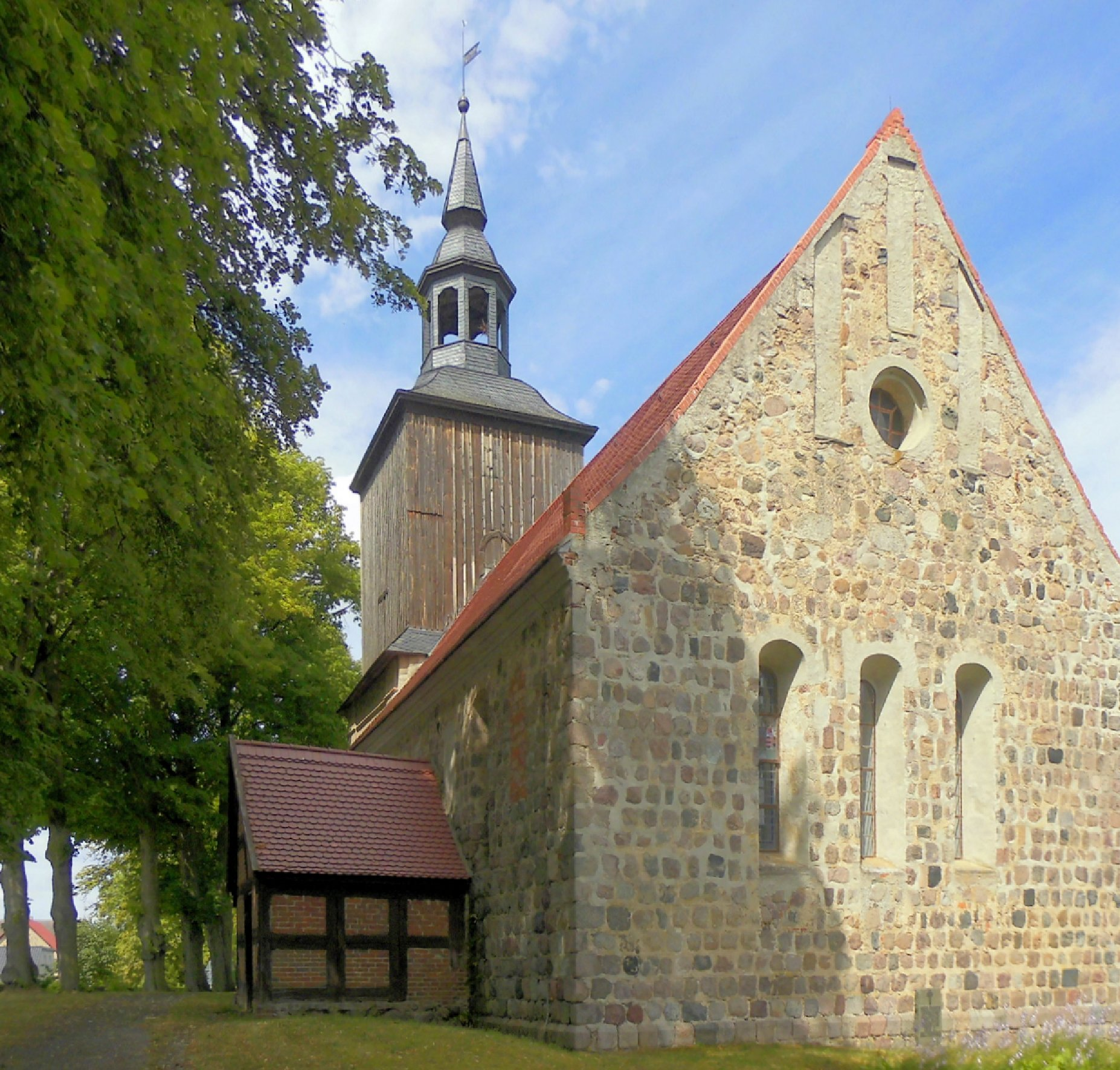 Dorfkirche in Hardenbeck, Gemeinde Boitzenburger Land, Landkreis Uckermark, Deutschland